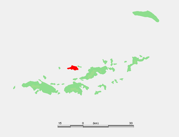 Caribbean - Jost Van Dyke detail.PNG